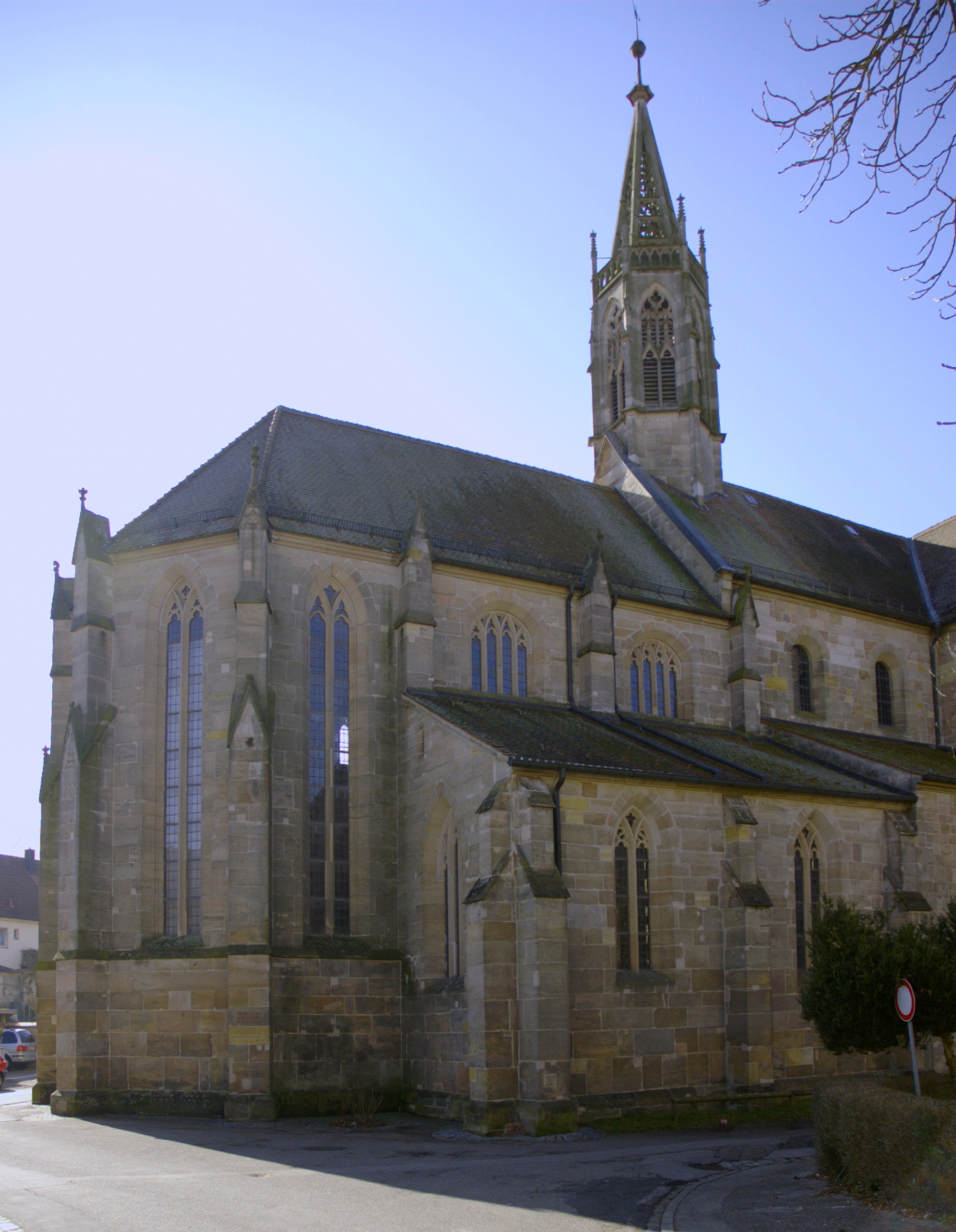 Münster Heilsbronn, Landkreis Ansbach Außenansicht; links: gotisches Chorhaupt, rechts: Dachreiter auf romanischem Vorchor